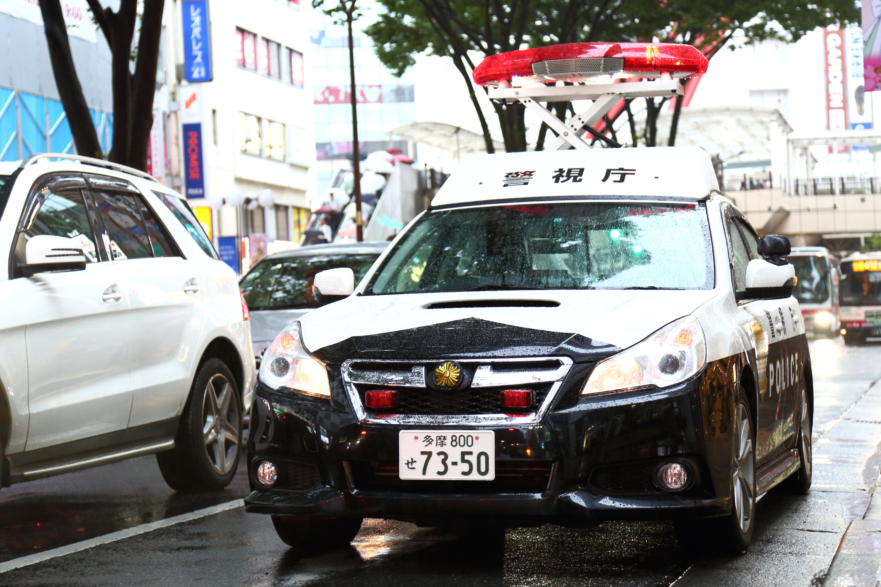 スバル 5代目レガシィのパトロールカー（パトランプ上昇中）